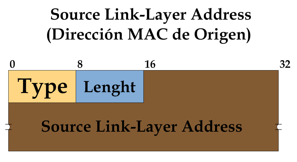 Formato de mensaje de opción ICMPv6 sobre la dirección MAC de origen.